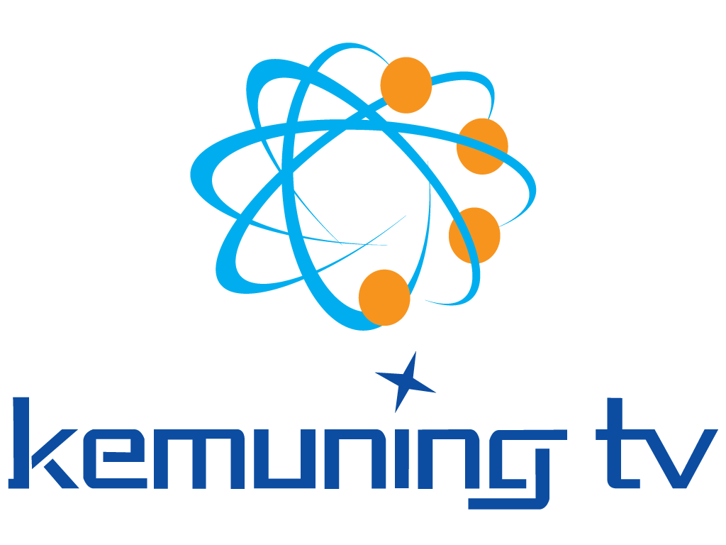 Kemuning TV stasiun TV lokal berlokasi di Karawang. Logo menggambarkan edaran satelit mengartikan informasi global dan up-to-date yang diberikan kepada audiens, warna biru pada jalur satelit dan tulisan menunjukkan informasi yang tepercaya dan kestabilan perusahaan, warna orange pada bola satelit mengartikan semangat dan kreatifitas yang disalurkan melalui informasi yang diberikan, tulisan Kemuning TV menggunakan huruf kecil agar sepadan dengan logo.